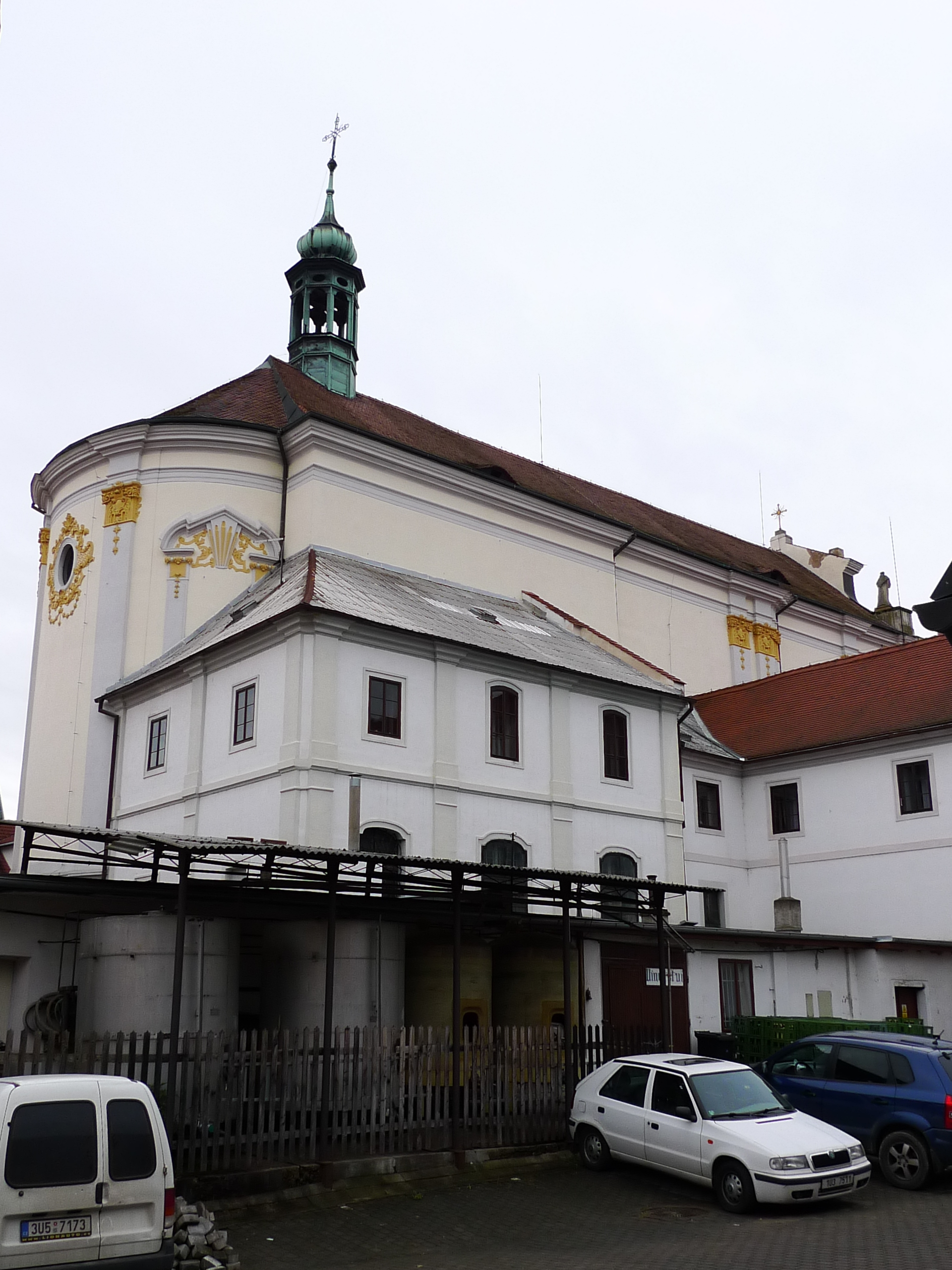 Klášter dominikánský (Litoměřice), Klášterní, Velká dominikánská 92/1, Litoměřice